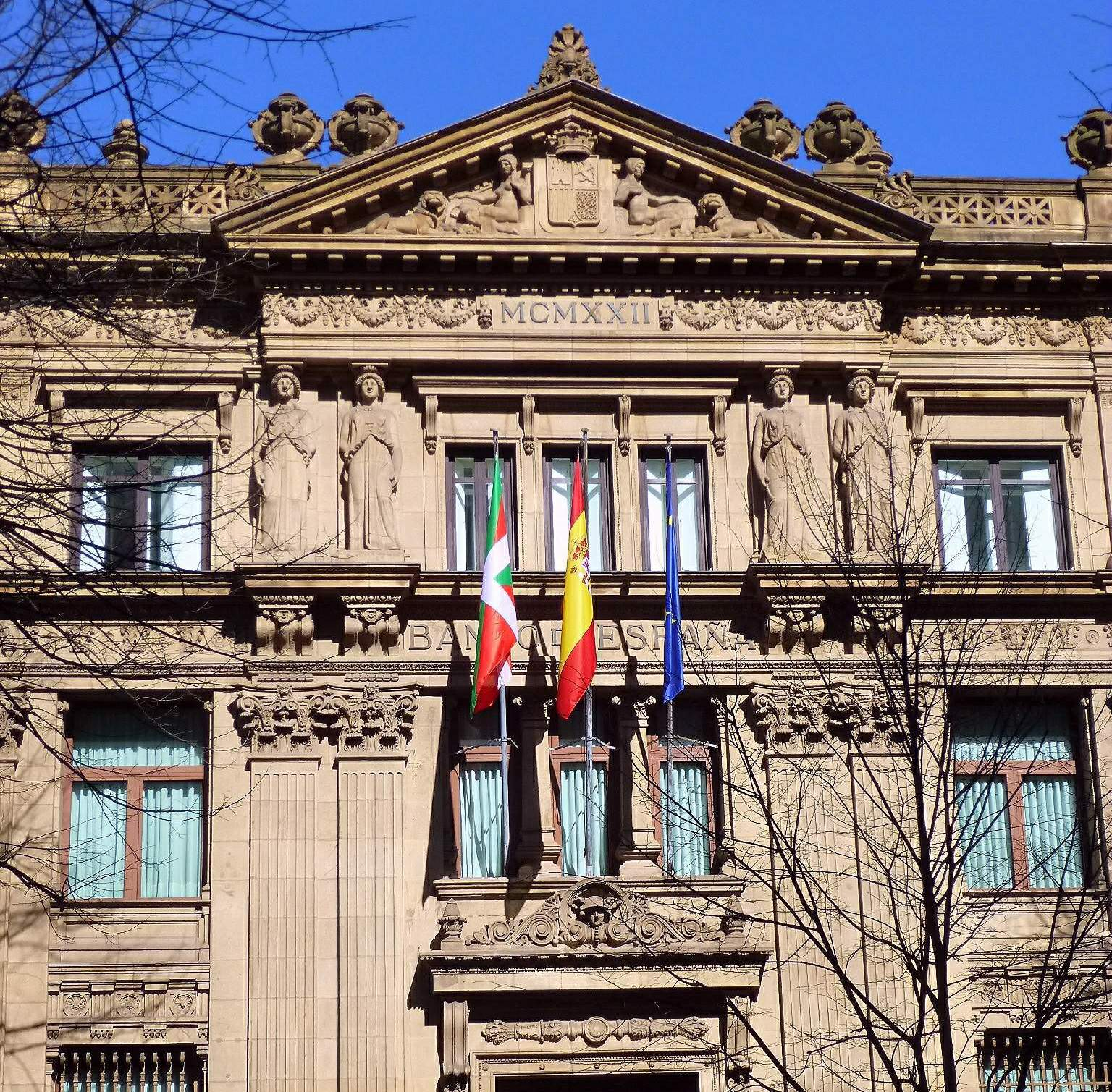 Delegación del Banco de España en Bilbao